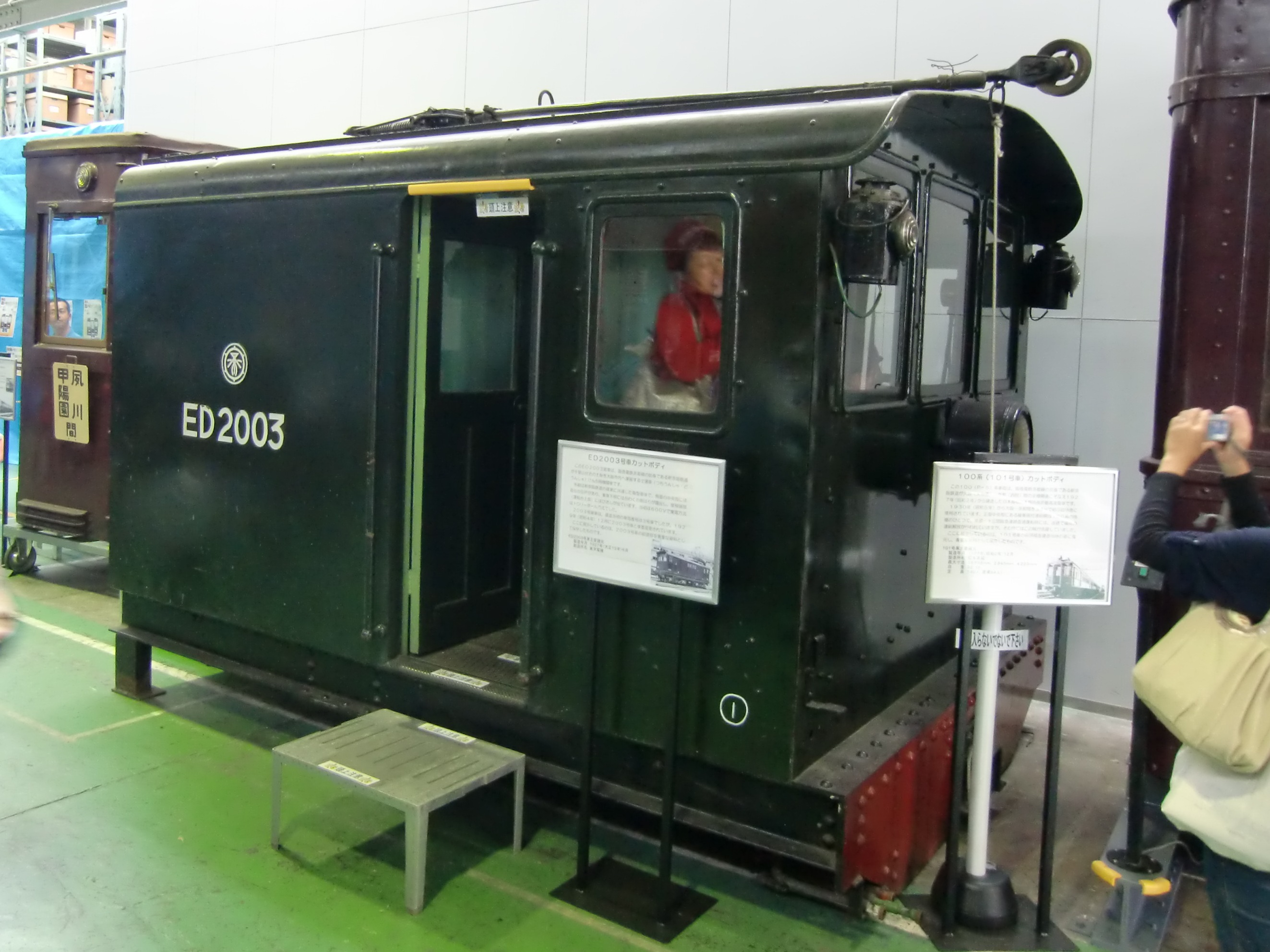 ED2003の前頭部（2010.10.24正雀工場内の阪急ミュージアムにて撮影）